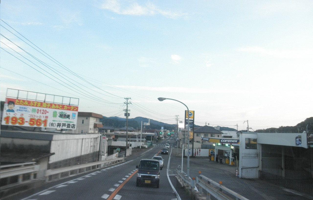 和歌山県西牟婁郡上富田町朝来 国道42号